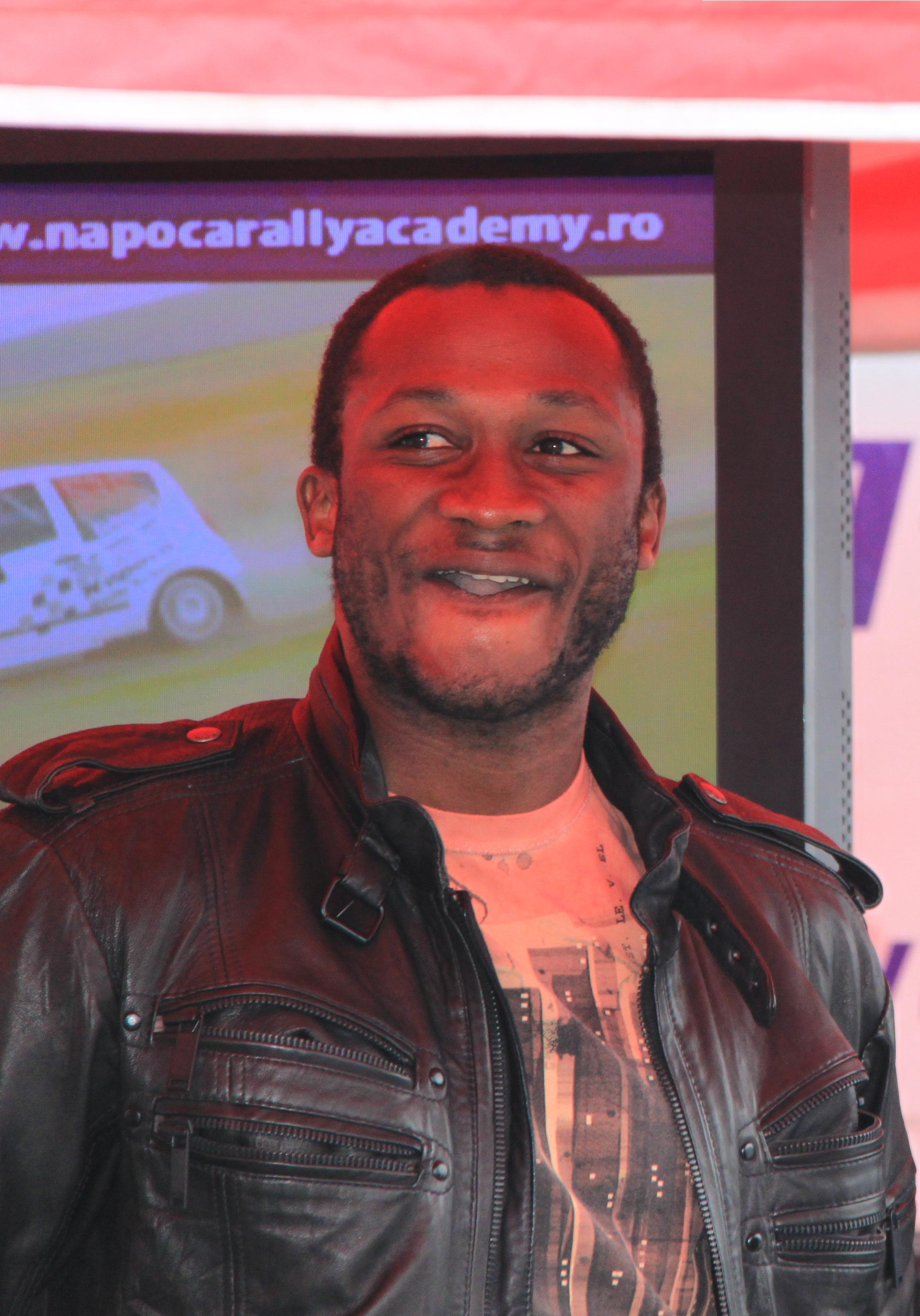 Bogdan Marisca si Yssouf Kone - Cluj-Napoca - Mai 2010